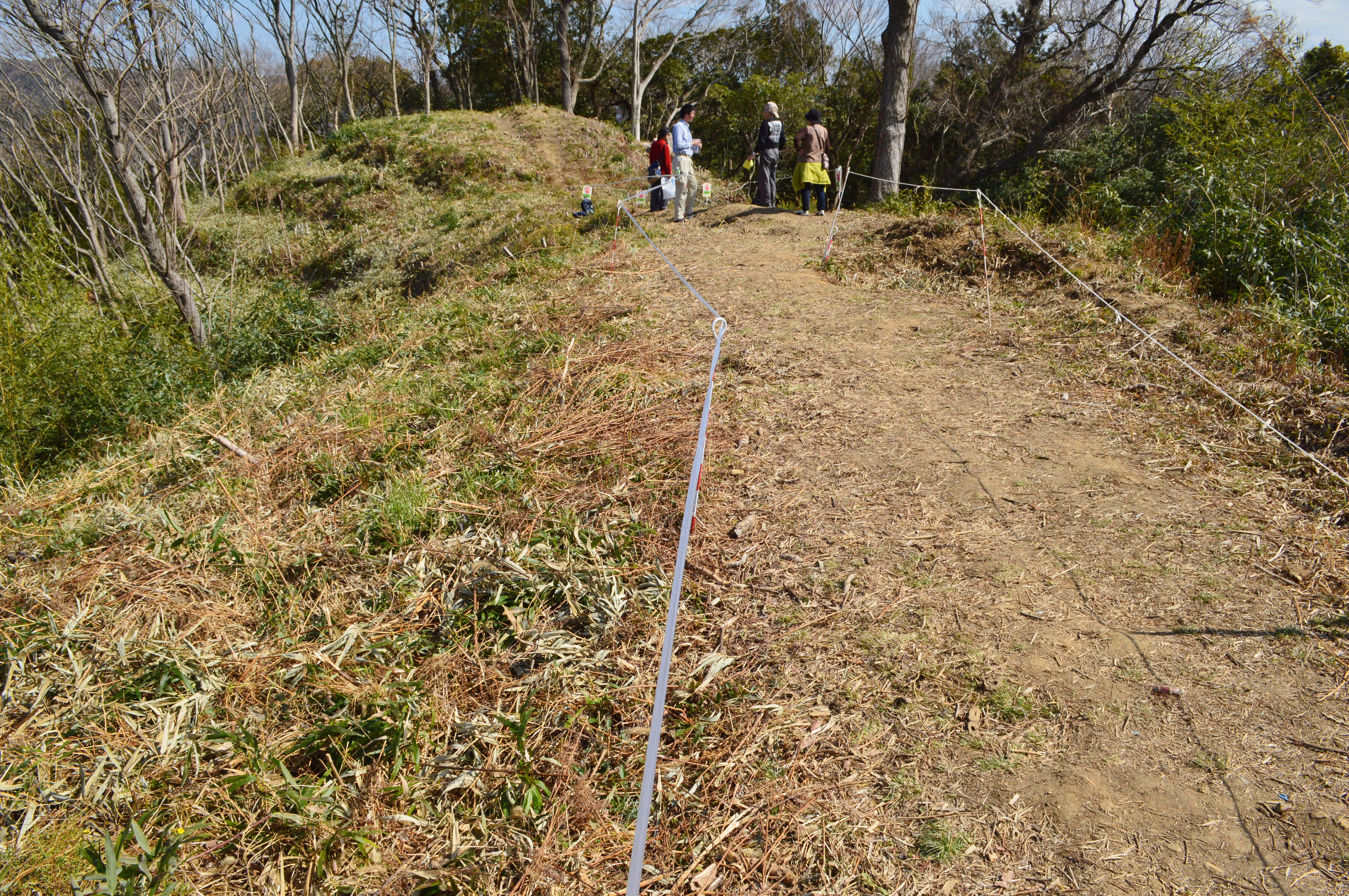 天王塚古墳 (和歌山市) 墳丘